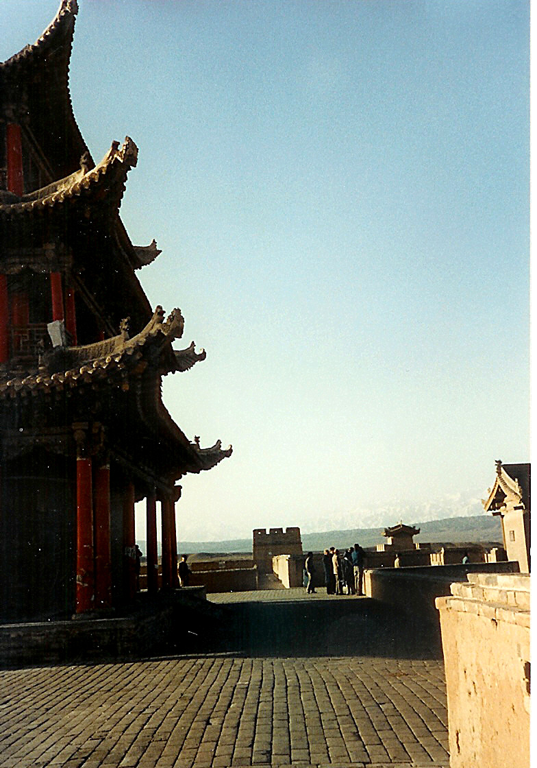 Dunhuang.